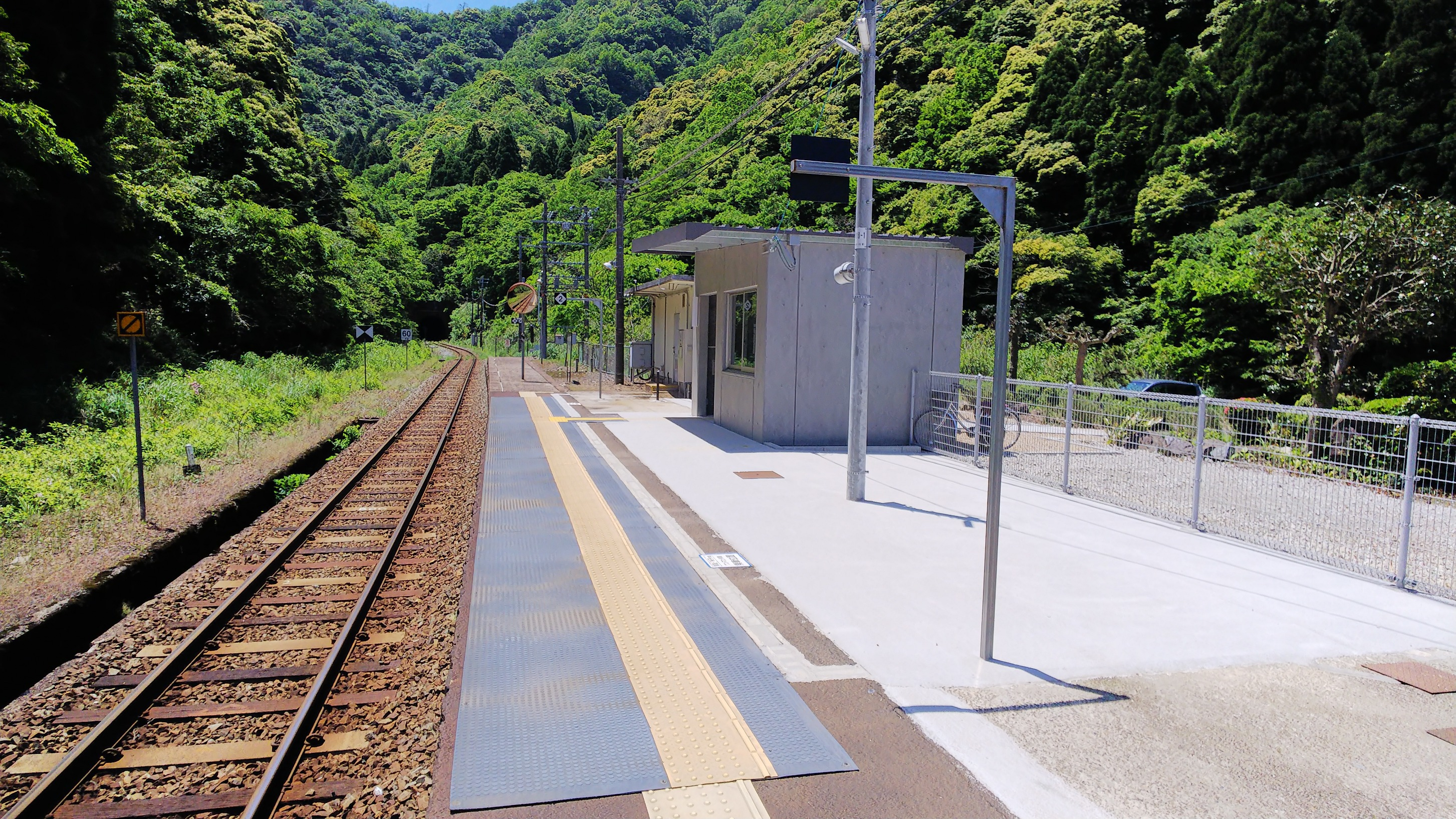 山陰本線 居組駅 構内 停留所化されている。